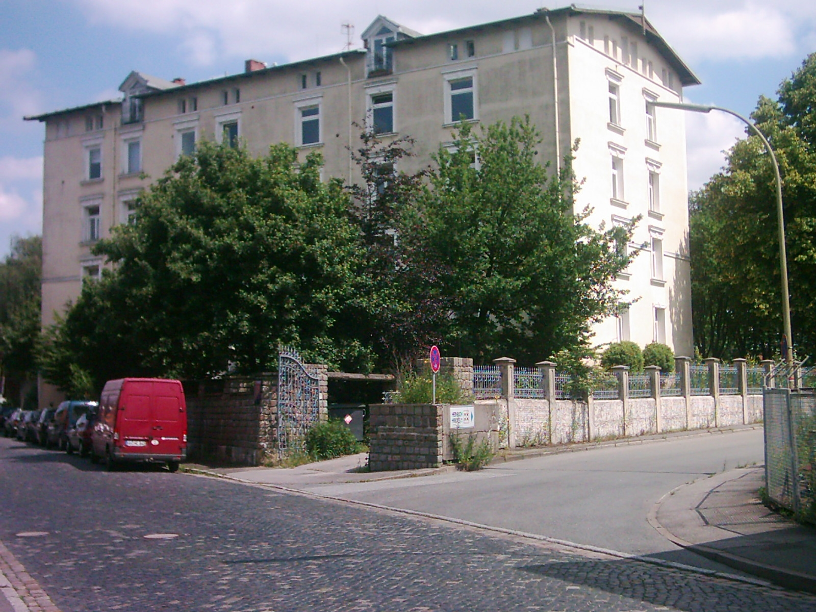 Das ehemalige Harburger Schloss. Erbaut im 14. Jahrhundert. Siehe auch Image:EhemHarburgerSchloss01.jpg.